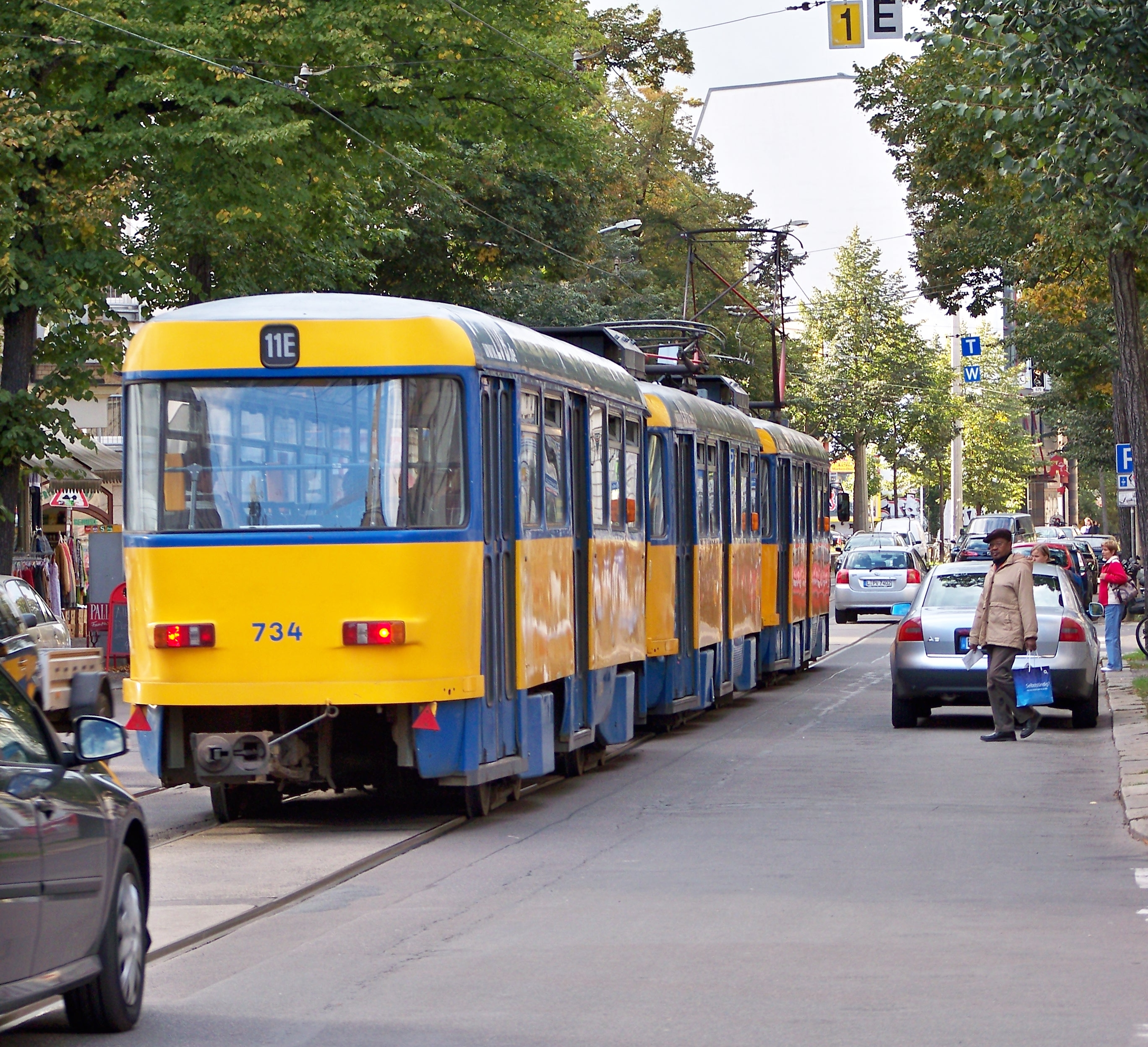 Tatra T4D-M Großzug in Leipzig auf der Linie 11E (Dölitz–Wahren) an der Haltestelle Pfeffingerstraße